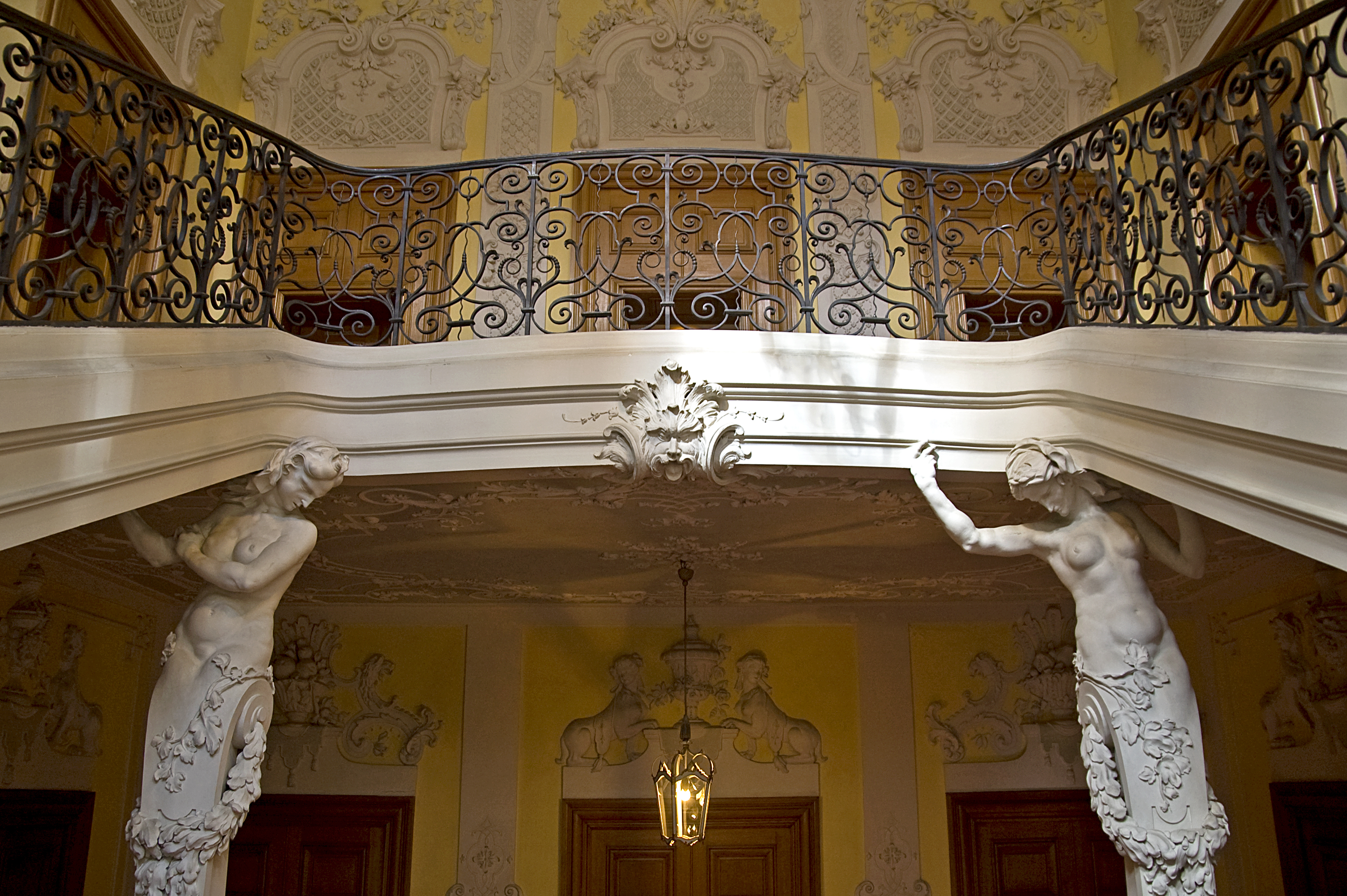 Palais Preysing - München - Treppenhaus Detail 6